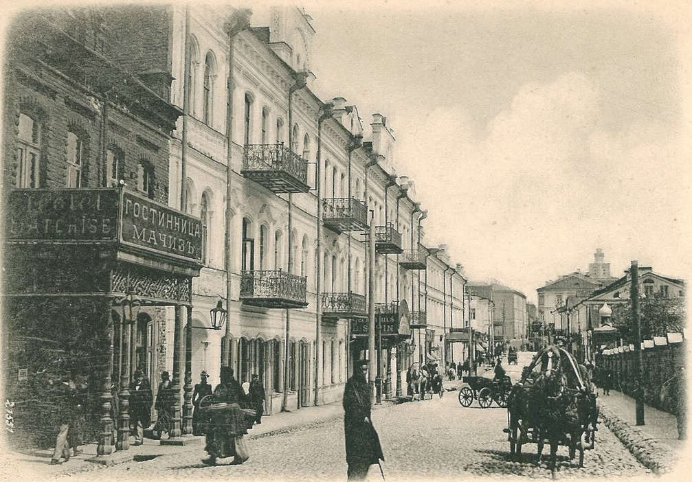 Перспектива Преображенской (Интернациональной) улицы в конце 19 века.